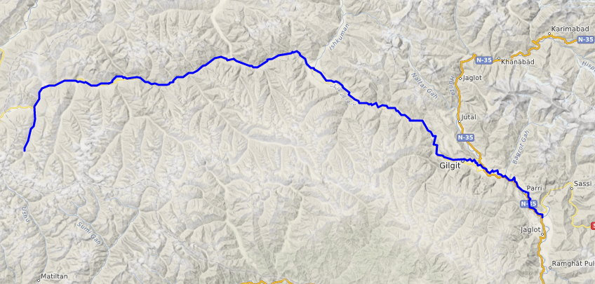 carte réalisée sur umap This map may be incomplete, and may contain errors. Don't rely solely on it for navigation.